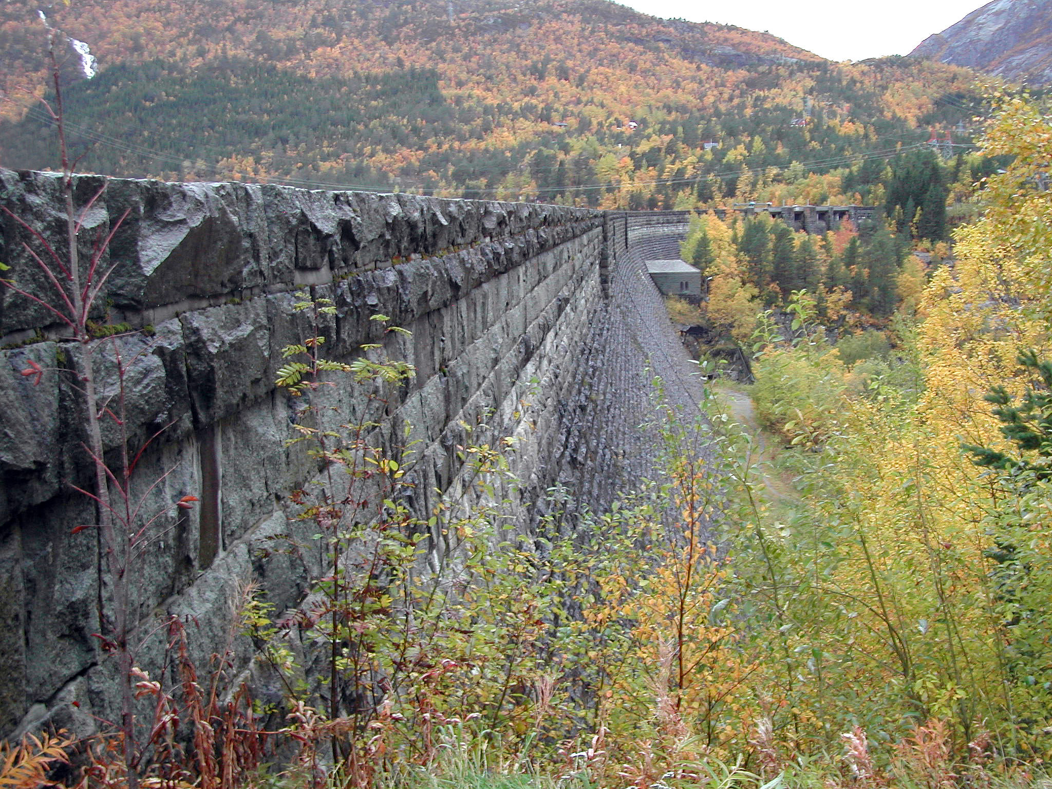 Massiv betongdam fra 1918 med steinmurt kledning på luftsiden. Anlagt i tilknytning til kraftverket Tysso I; et fredet kraftanlegg fra år 2000. Dammen inngår ikke i fredningen. Dato: 2009.